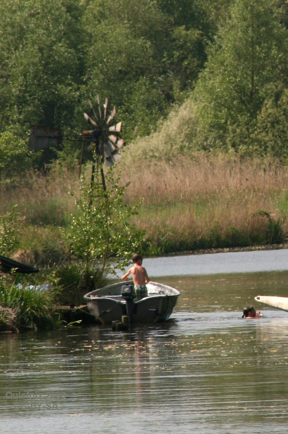 Nijetrijne: Windmotor nr 1